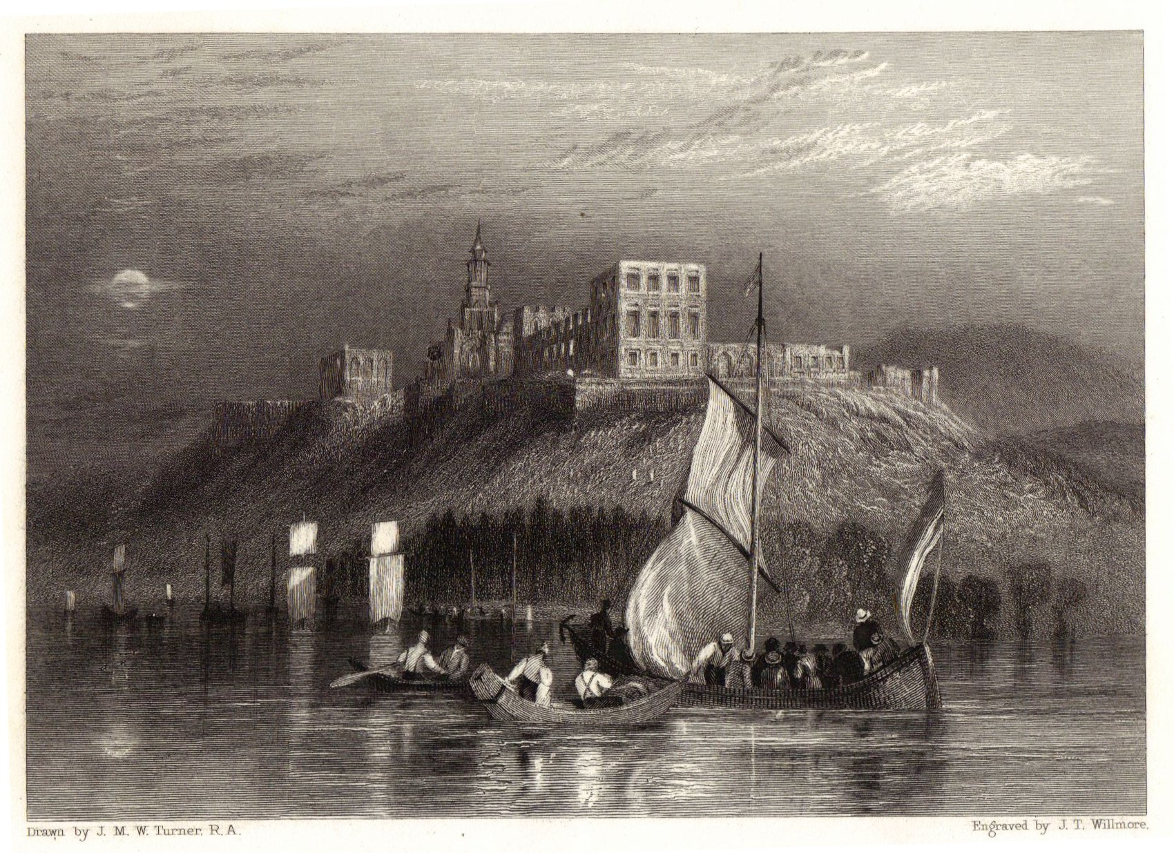 Montjean sur Loire in 1830 (Joseph Mallord William Turner, Voyage sur la Loire, 1826-1828-1830)